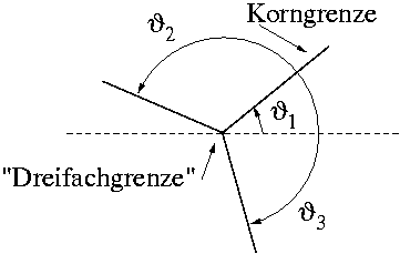 Leiterbahn Dreifachkorngrenze